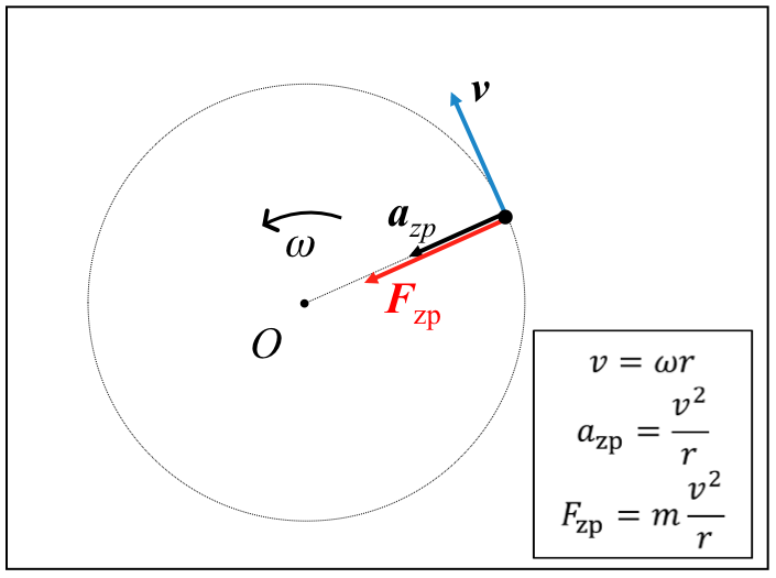 Higidura zirkular uniformeko abiadura, azelerazio zentripetua eta indar zentripetua adierazten dituen eskema grafikoa.